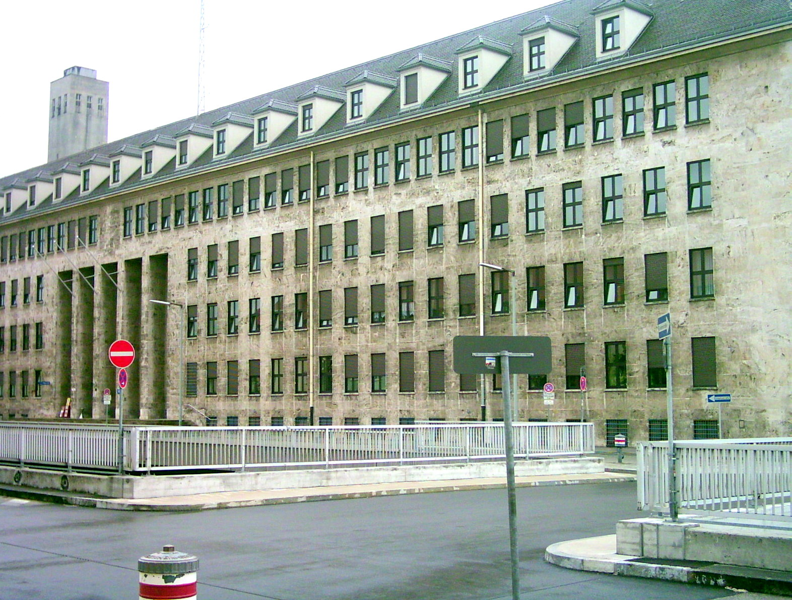 ehemalige McGraw-Kaserne München-Giesing